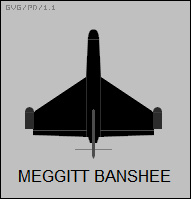 Meggitt Banshee drawing